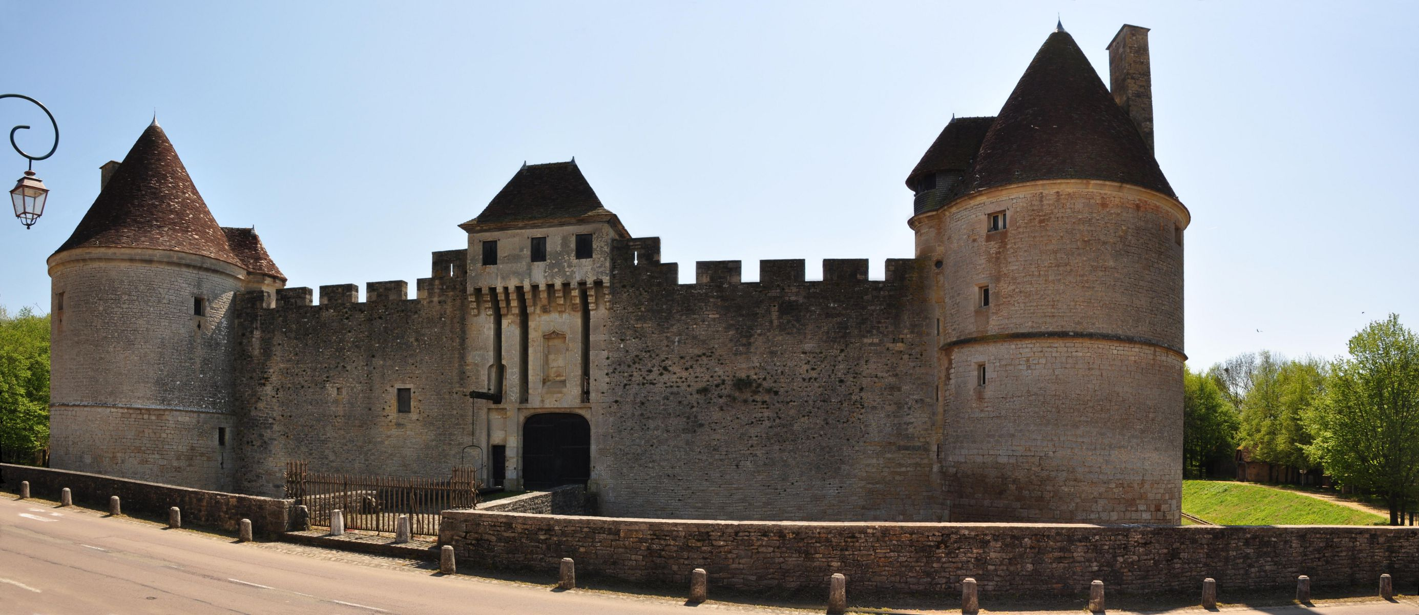 Schloss Posanges in Burgund, Nordwest-Ansicht